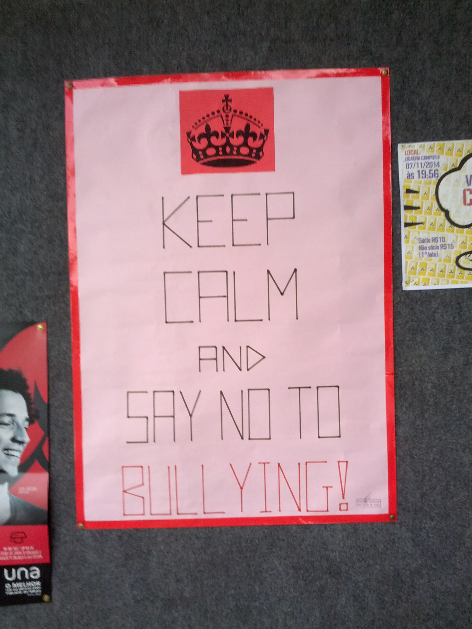 Cartaz de uma campanha contra o bullying no campus I do Centro Federal de Educação Tecnológica de Minas Gerais, em Belo Horizonte.